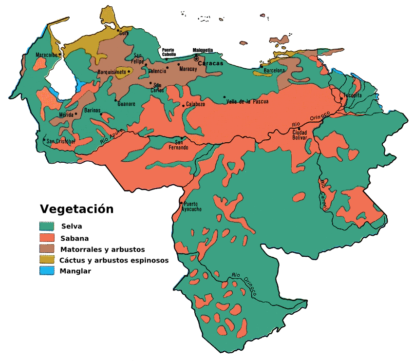 Vegetation map of Venezuela.